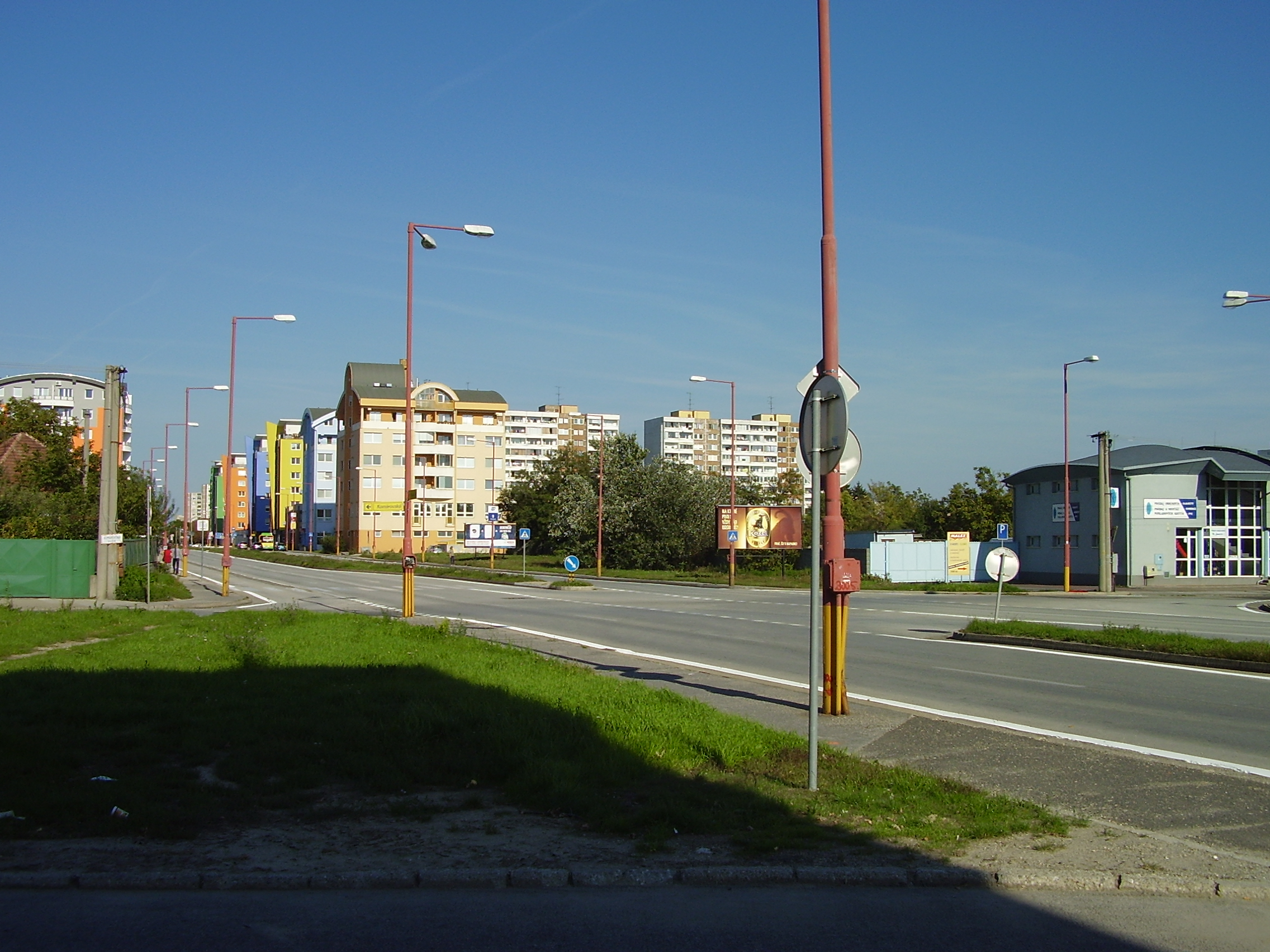 Bratislava